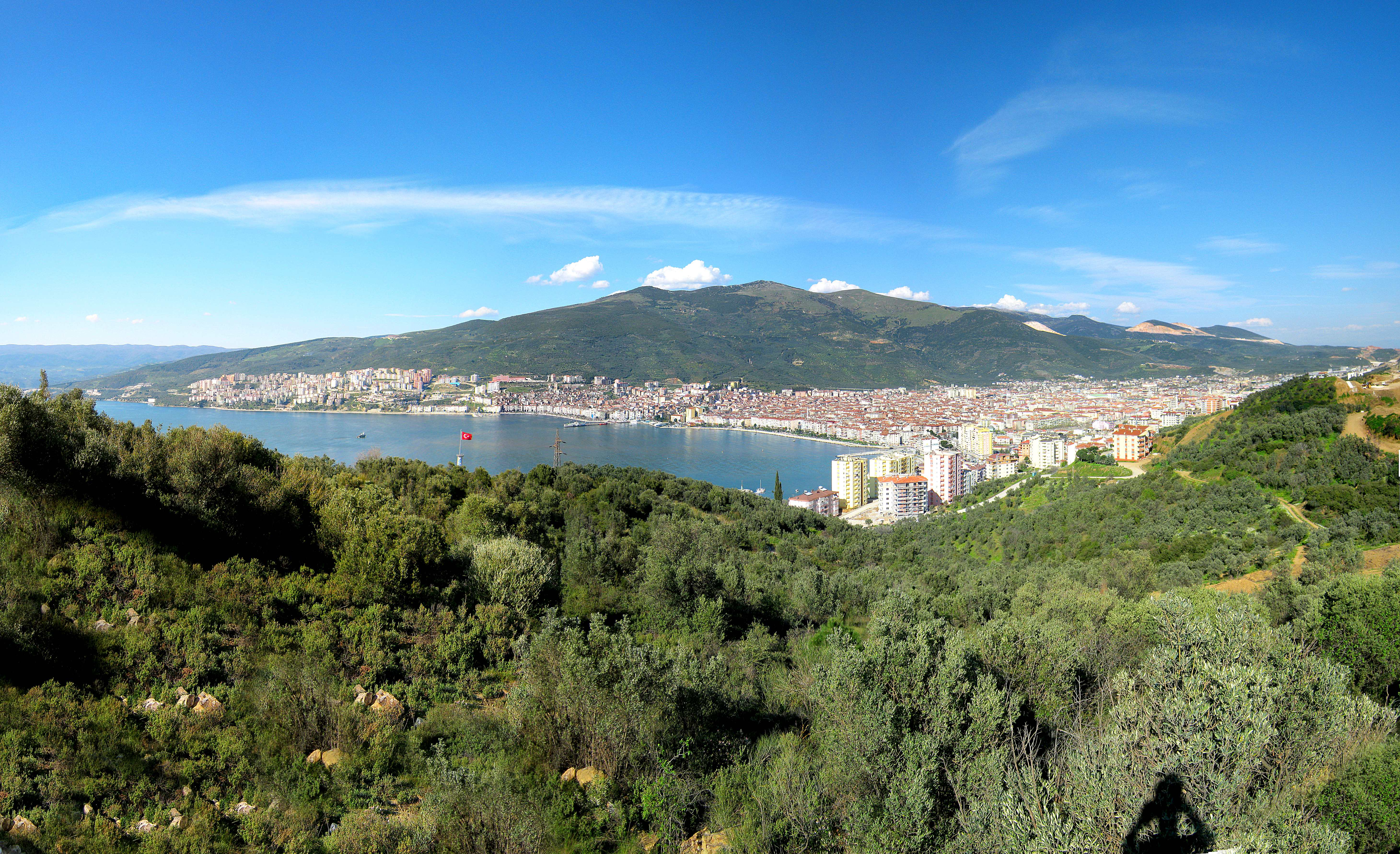 gemlik limanı gemlik bursa